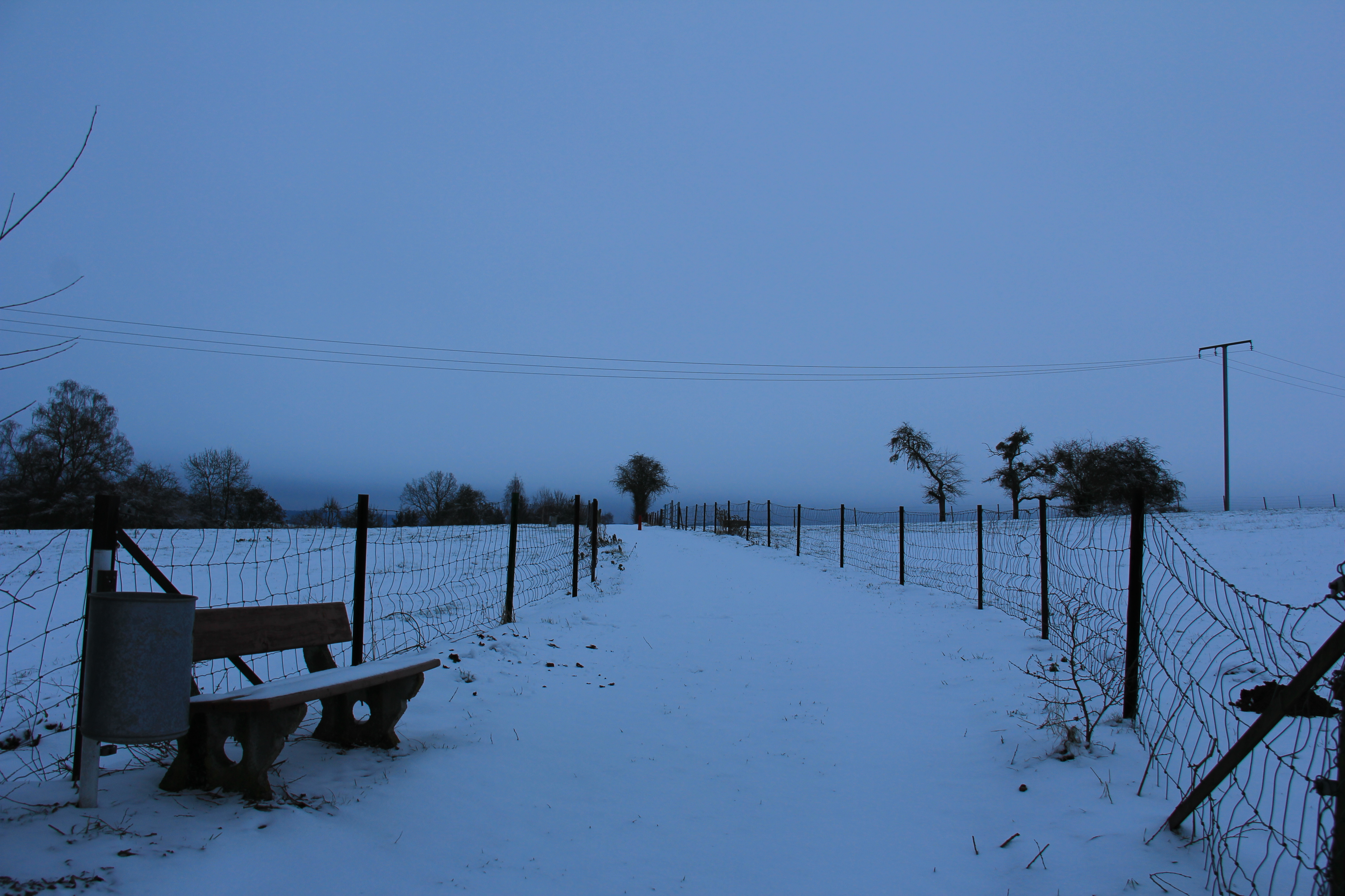 Wanter zu Lëtzebuerg zu Näerden (Gemeng Biekerech, Kanton Réiden) um Flouer genannt 'Aker'